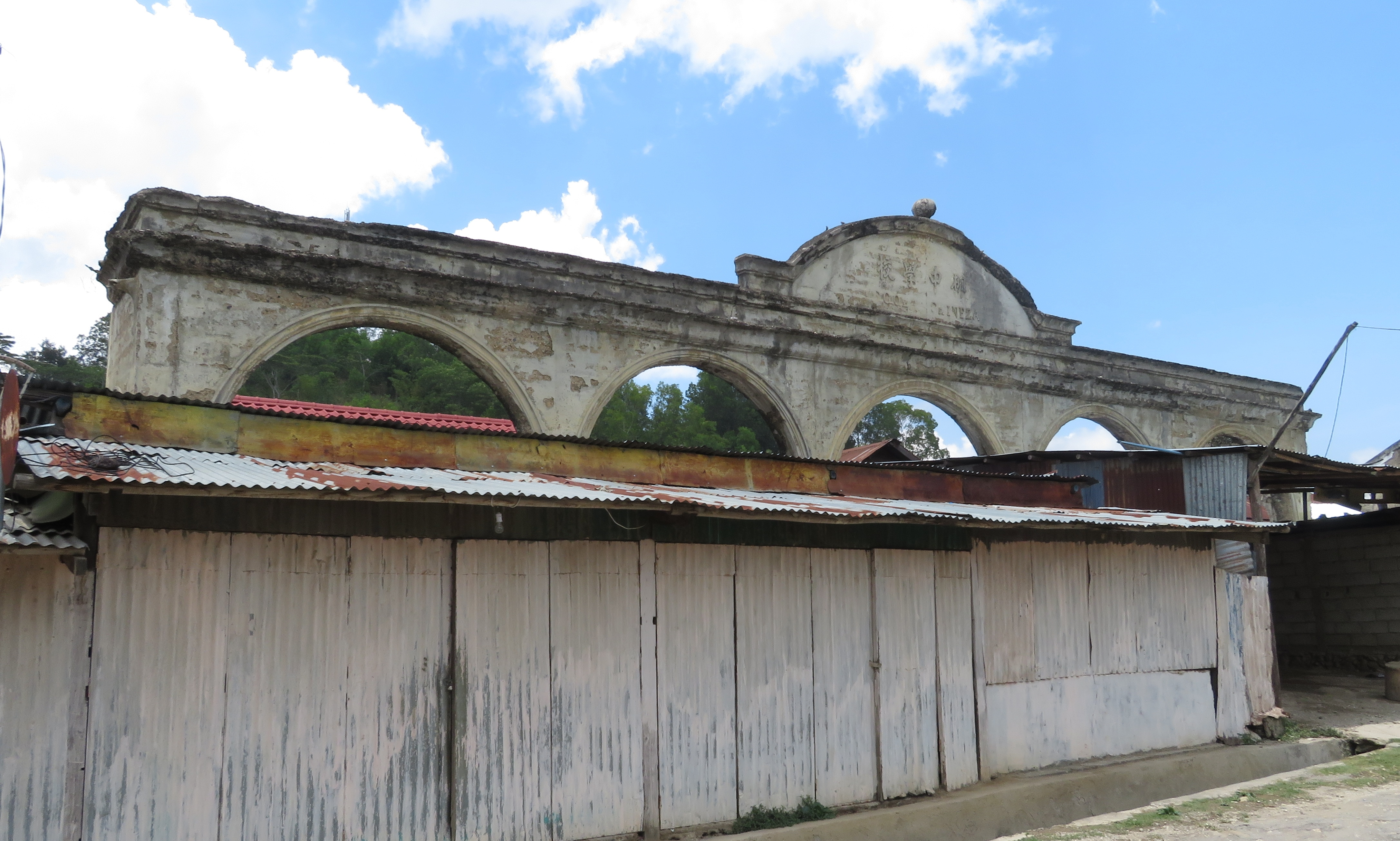 Ruine der chines. Schule, Aileu, Timor Leste